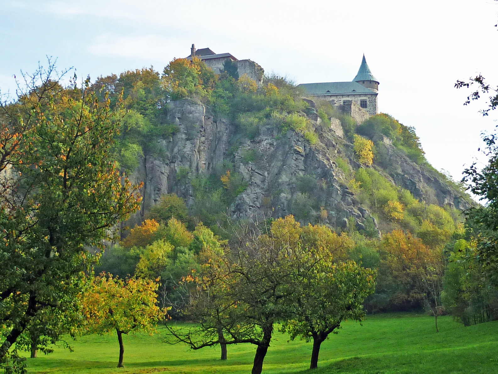 Burg auf dem Kunietitzer Berg (Kunětická Hora) bei Pardubitz (Pardubice)